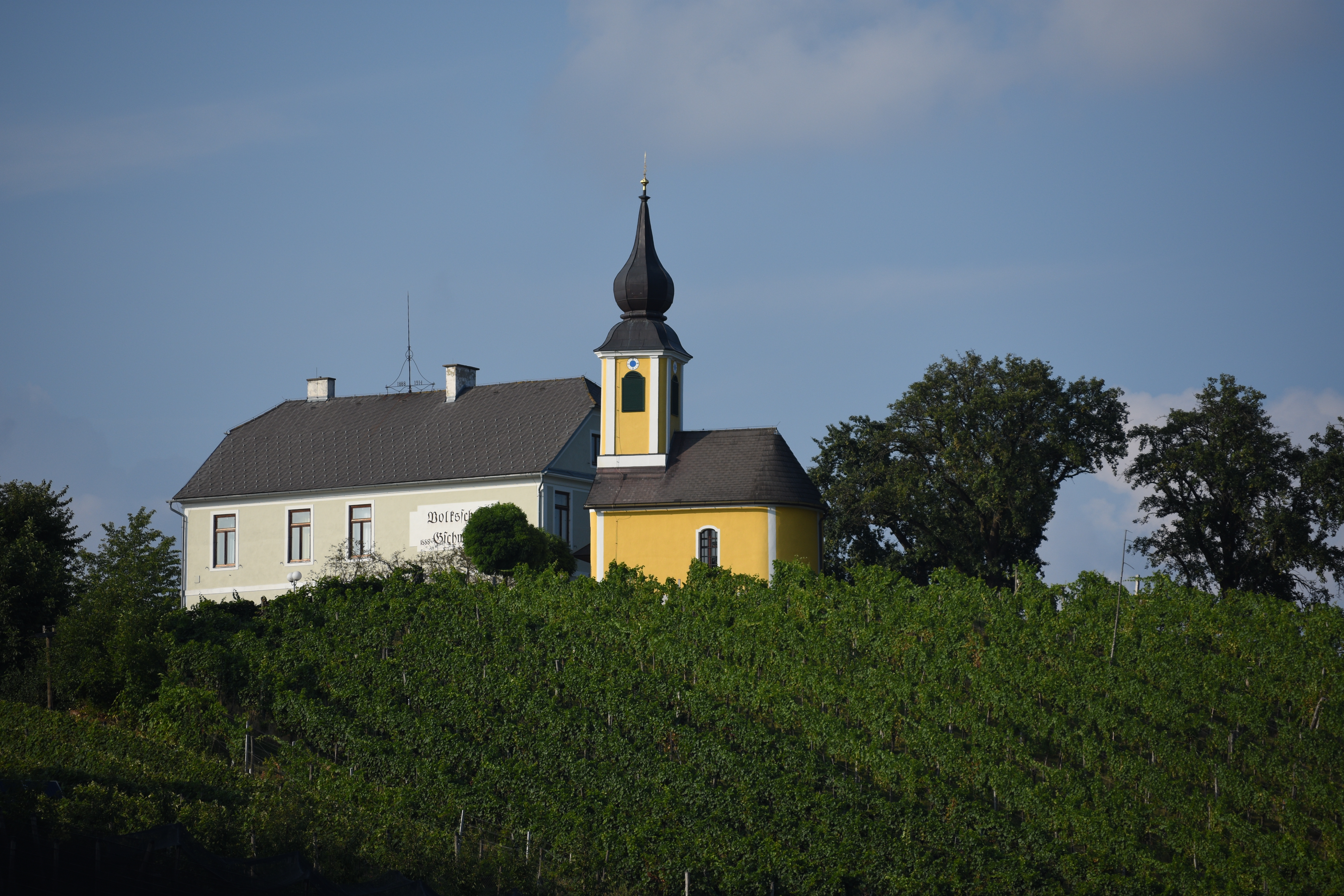 Gschmaier bei Gersdorf an der Feistritz